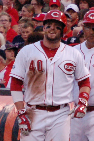 Tyler Holt